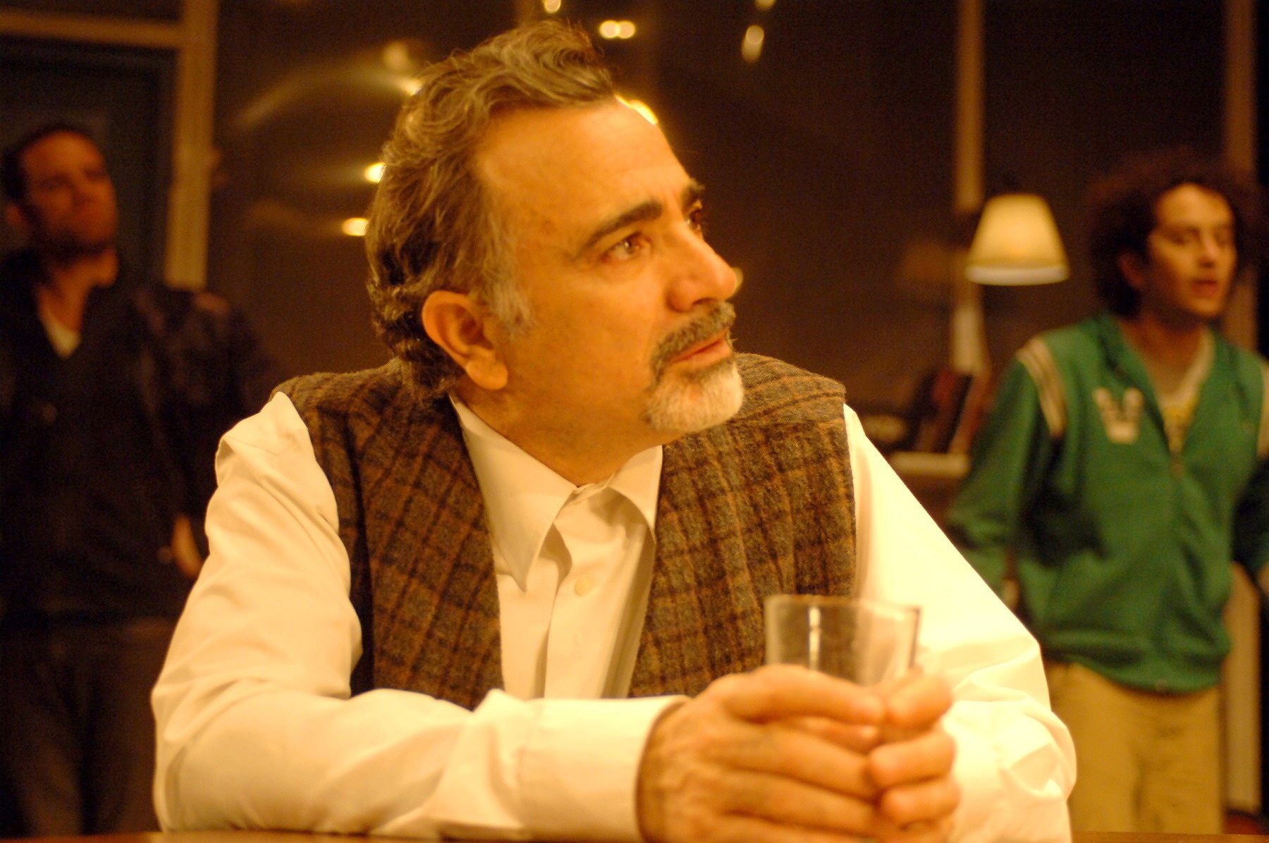 משה איבגי בהצגה הבן הבכור, תיאטרון גשר